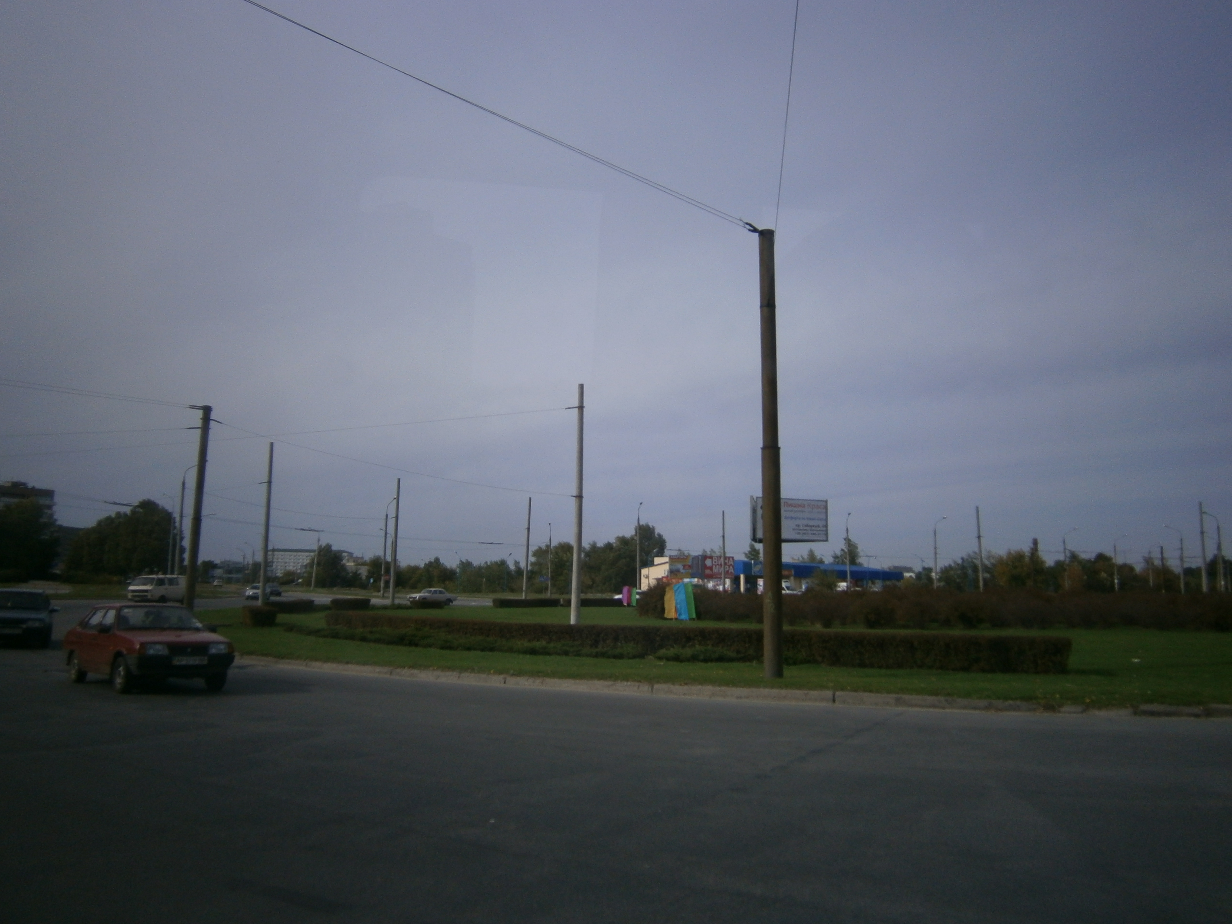 Запоріжжя, вул. Автозаводська